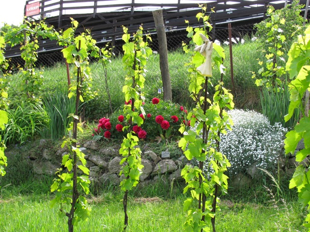 Vinice Máchalka - keře révy